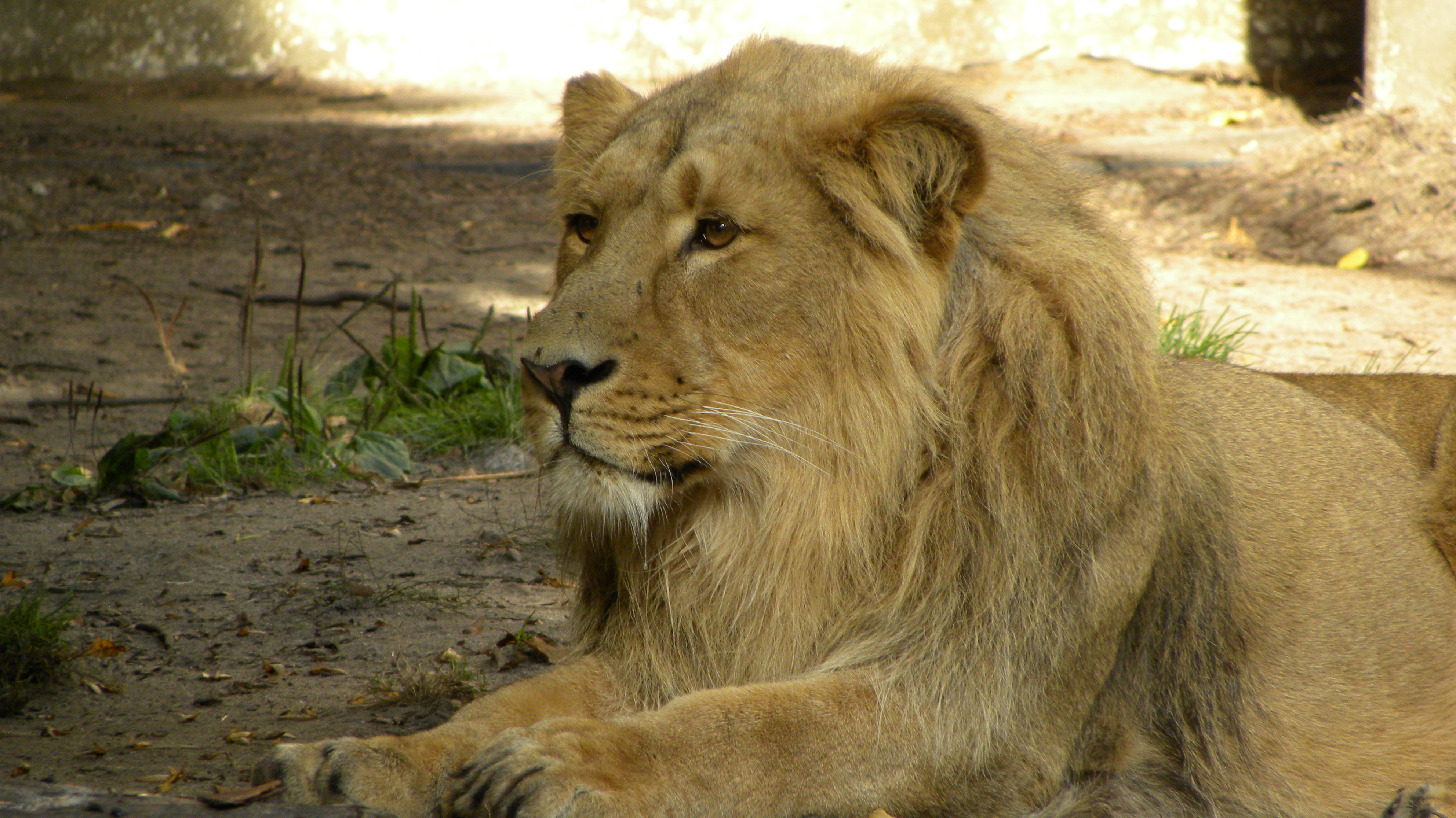 Aziatische leeuw